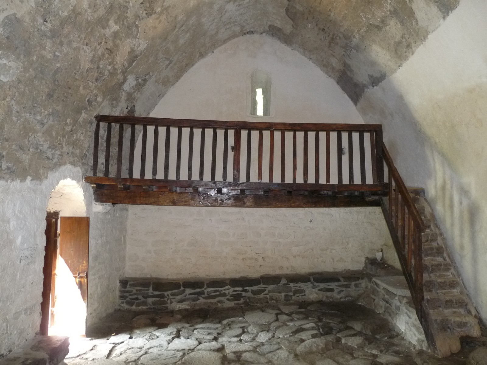 Chapelle St-Martin d'Envalls, Pyrénées-Orientales, France